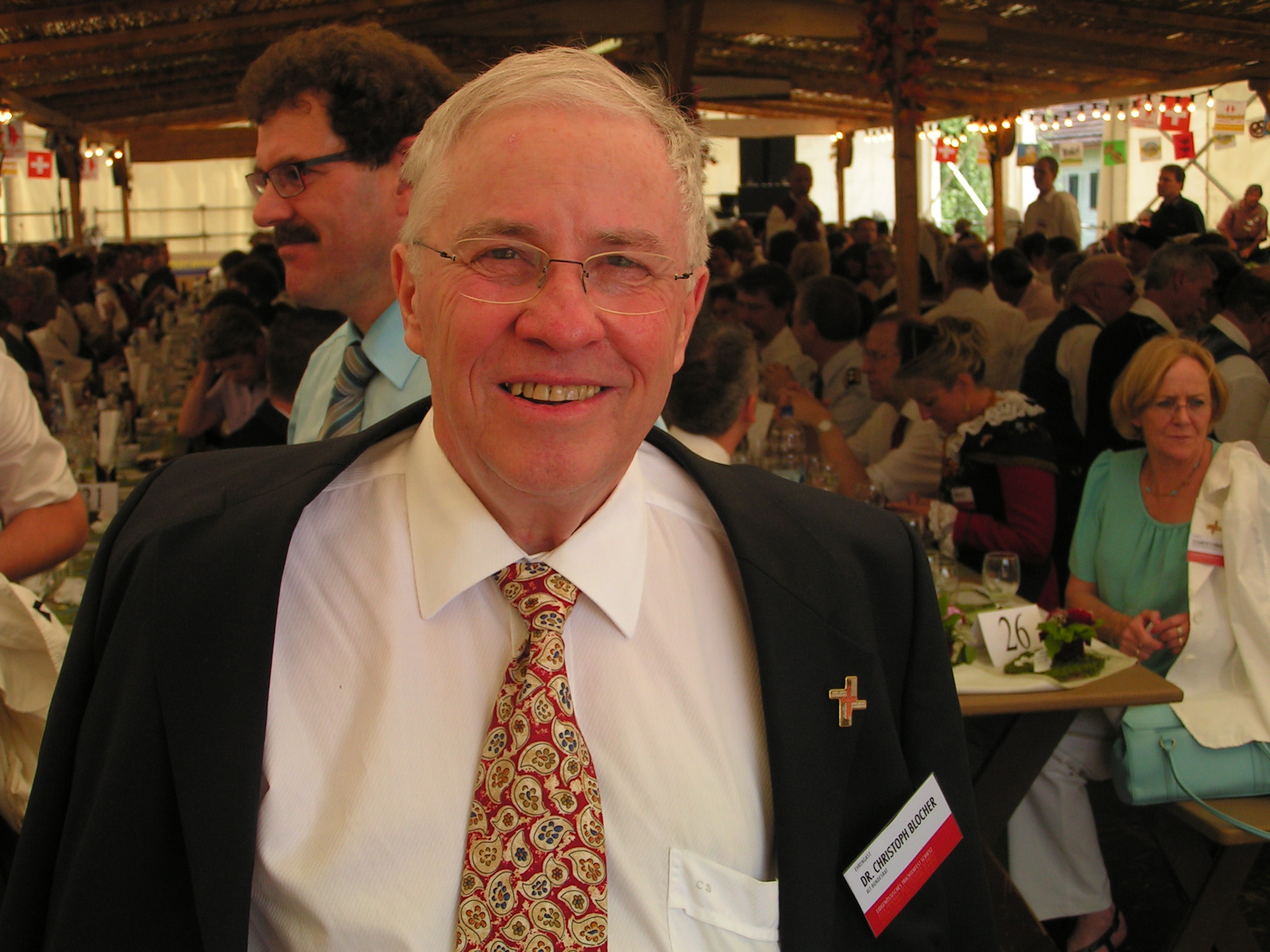 Alt Bundesrat Christoph Blocher als Ehrengast am Eidgenössischen Trachtenfest 2010 in Schwyz